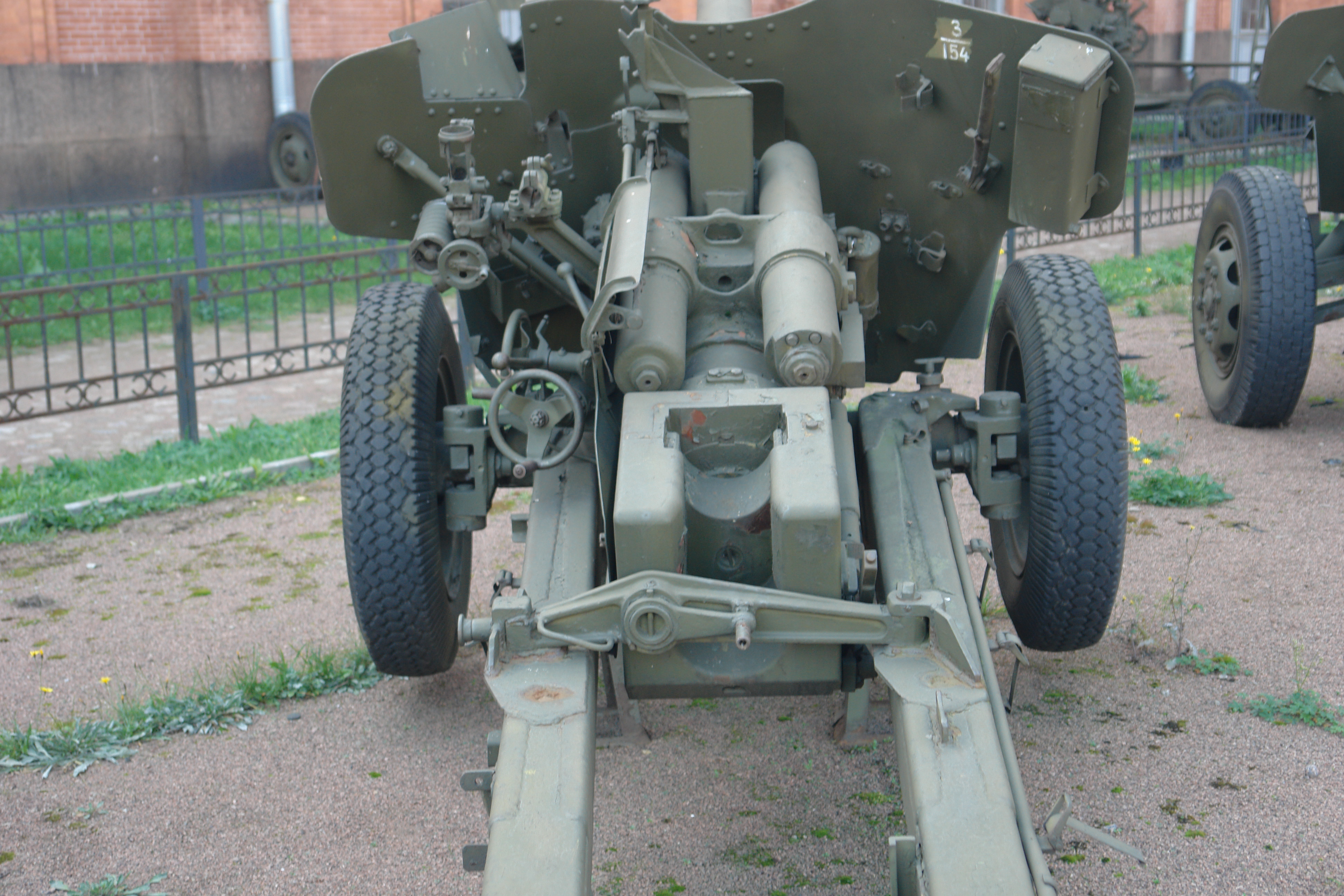 100-мм ПРОТИВОТАНКОВАЯ ПУШКА Т-12 (2А19) "РАПИРА" ПРИНЯТА НА ВООРУЖЕНИЕ В 1961 г. ГЛАВНЫЙ КОНСТРУКТОР Г.И.ЛУКЬЯНЧЕНКО. lbHOCTb, M: СТРЕЛЬБЫ-6000, ПРЯМОГО ВЫСТРЕЛ СКОРОСТРЕЛЬНОСТЬ - ДО 14 ВЫСТР/МИН. МАССА ОРУДИЯ-2800. РАСЧЕТ - 7 ЧЕЛОВЕК. Военно-исторический музей артиллерии, инженерных войск и войск связи, Санкт-Петербург.